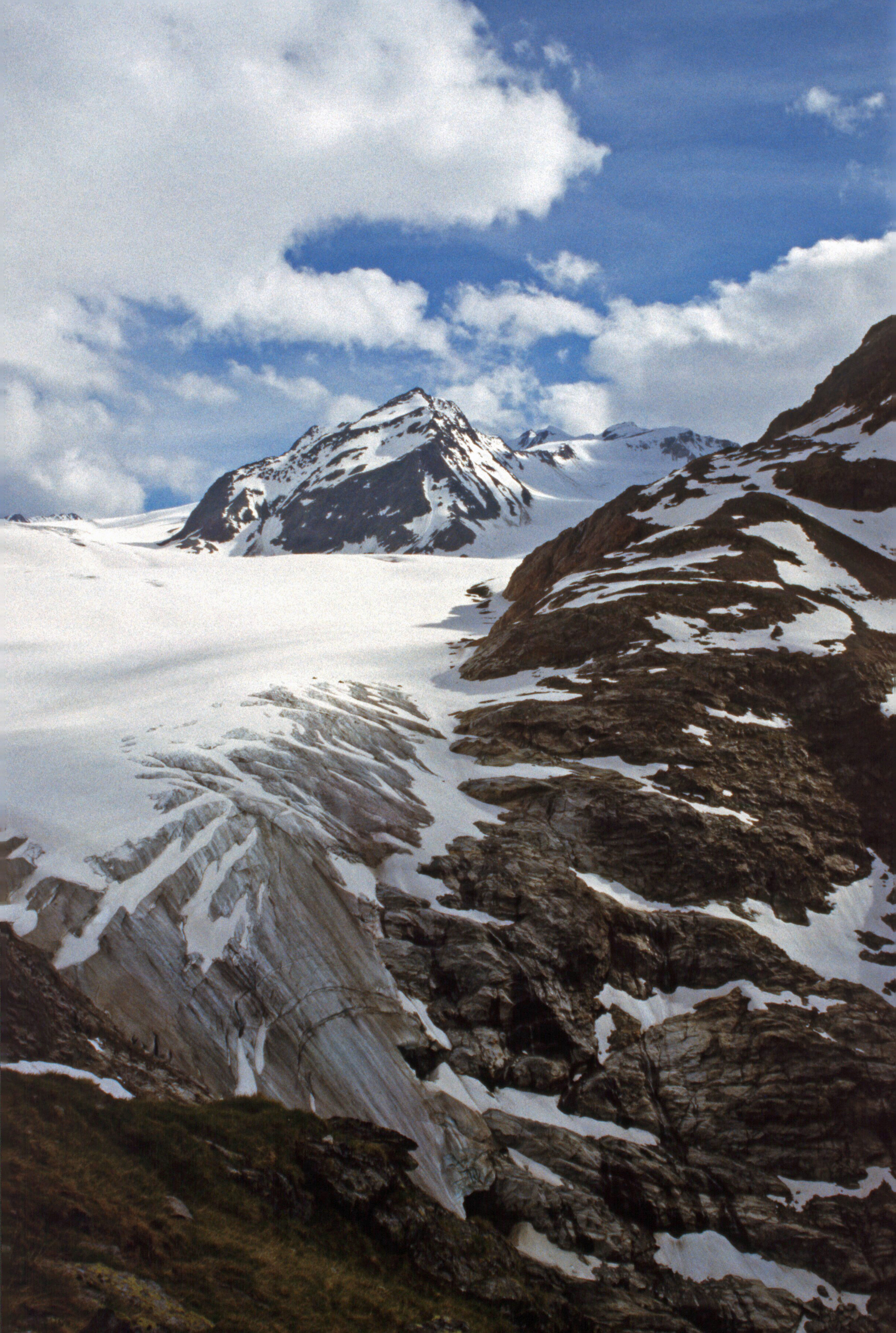 Mittelbergferner von Süden, vom Anstiegsweg zur Braunschweiger Hütte, Juli 1999